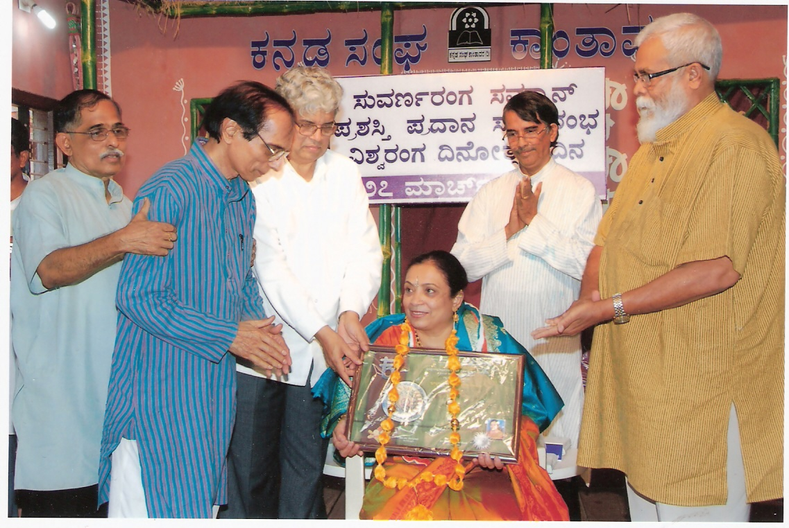 ಕನ್ನಡ: recieving `Suvarna ranga sammaan' award.(Dr. Na. Mogasale, Sri. Sadananda Suvarna, Prof. E Radhakrishna, Na.Damodar Shetty and D.K. Chowta)